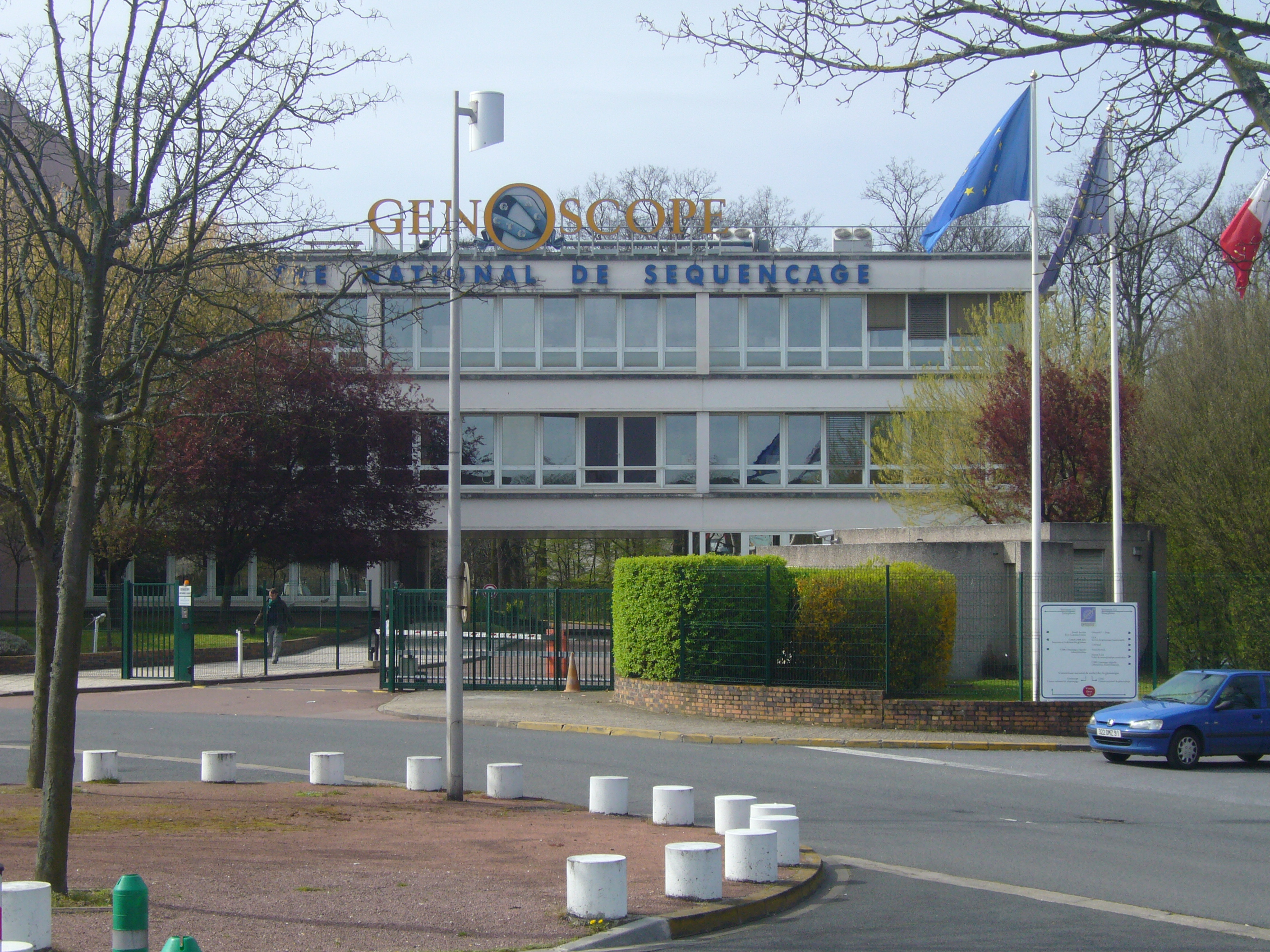 Centre National de Sequencage, Genoscope, CNS, 2 rue Gaston Crémieux CP5706 91057 Evry cedex France